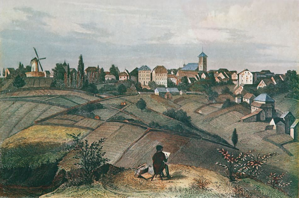 Windmühle (links) und reformierte Kirche. Die lutherische Kirche im Hintergrund. Rechts neben der Windmühle die damalige katholische Kirche